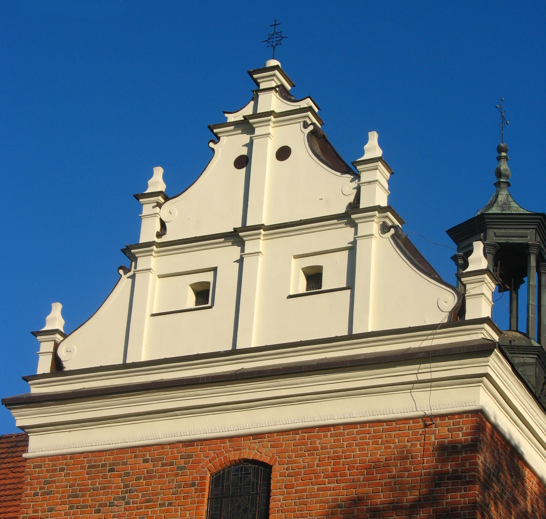 Renesansowa attyka na południowej elewacji kościoła św. Mateusza w Pabianicach